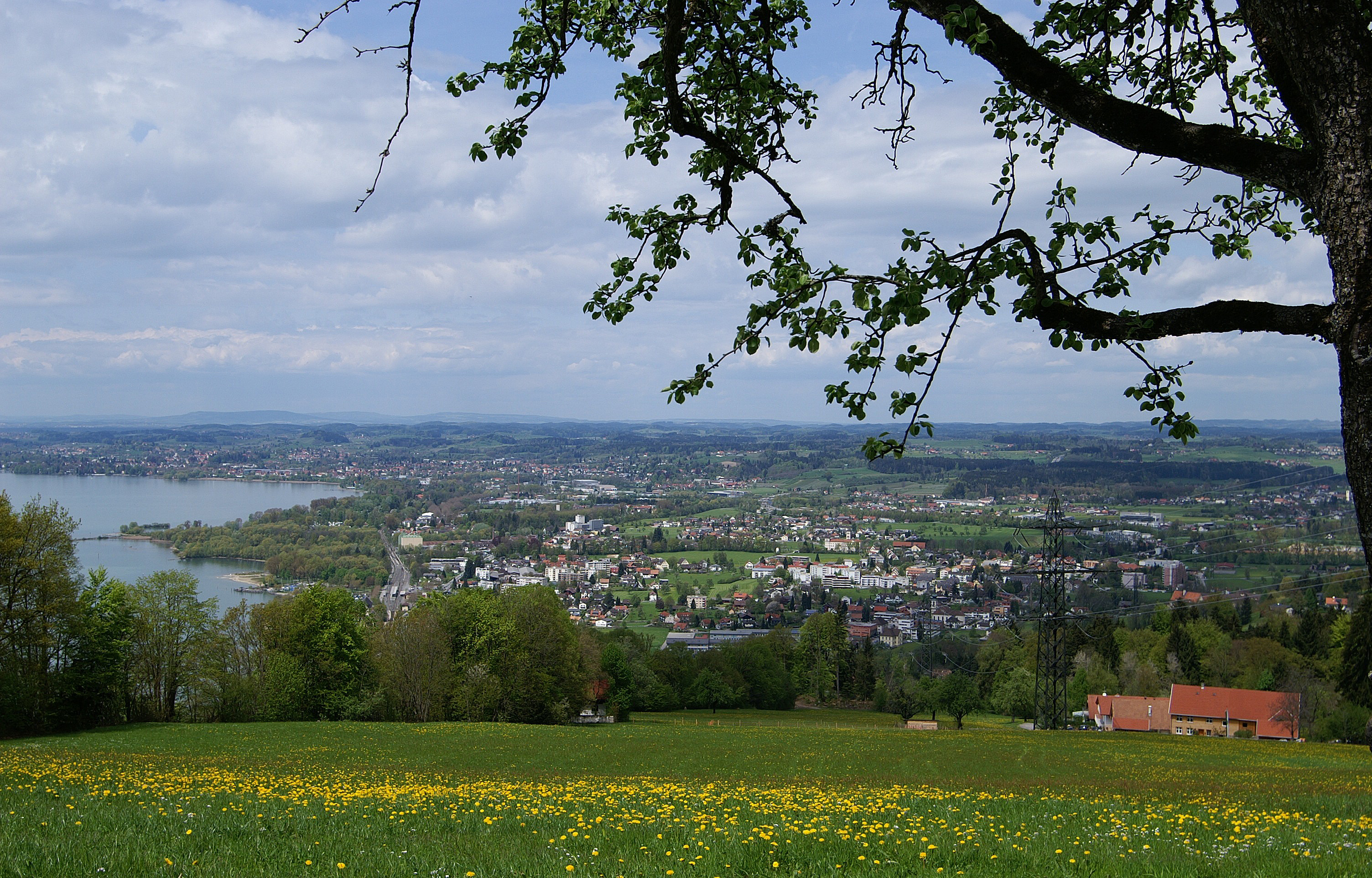 Blick vom Haggen auf Lochau am Bodensee